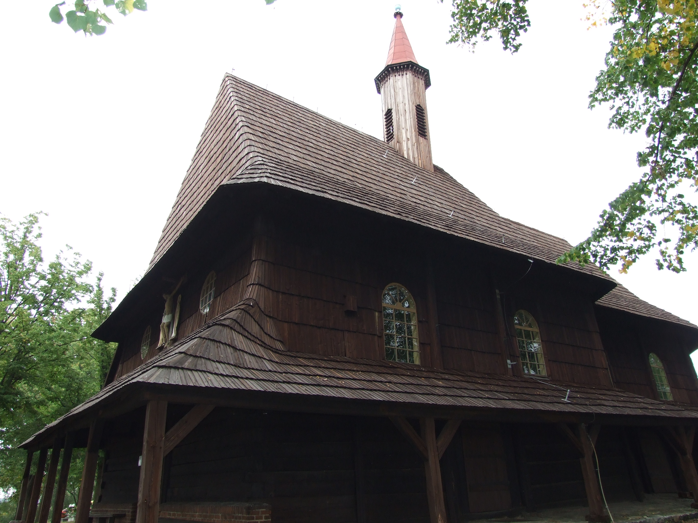 Kościół św. Rocha w Grodzisku (powiat oleski)